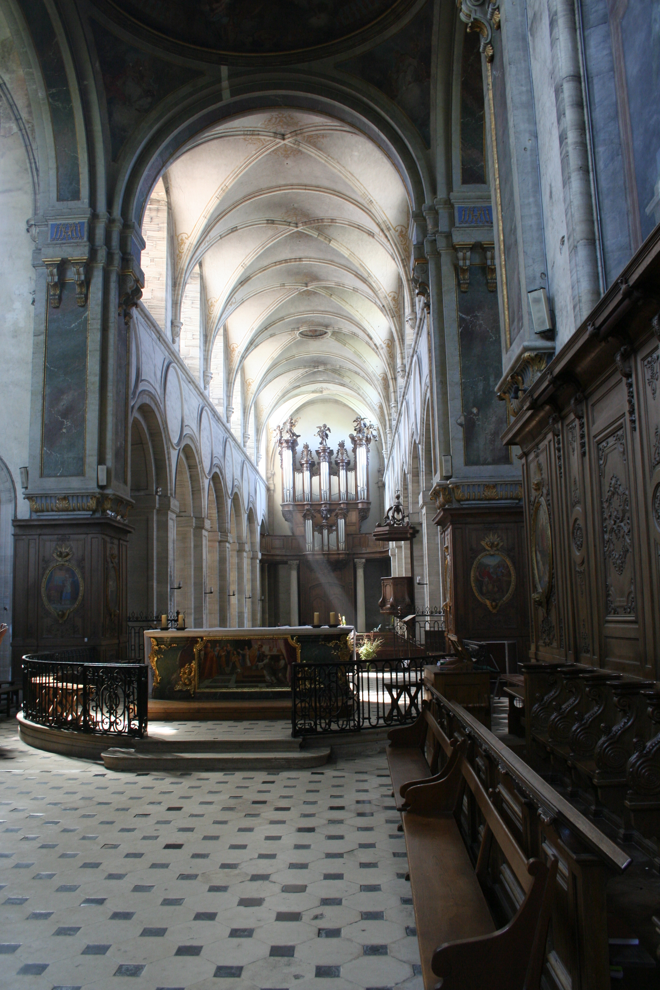 Abbaye de Mondaye - Juaye-Monaye - Calvados - France